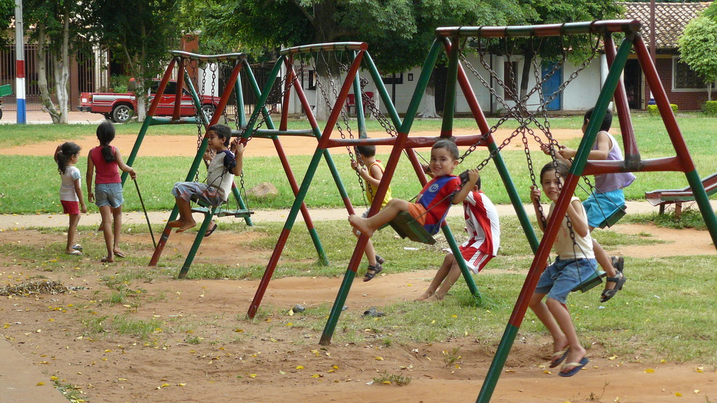 Guarambaré.Plaza